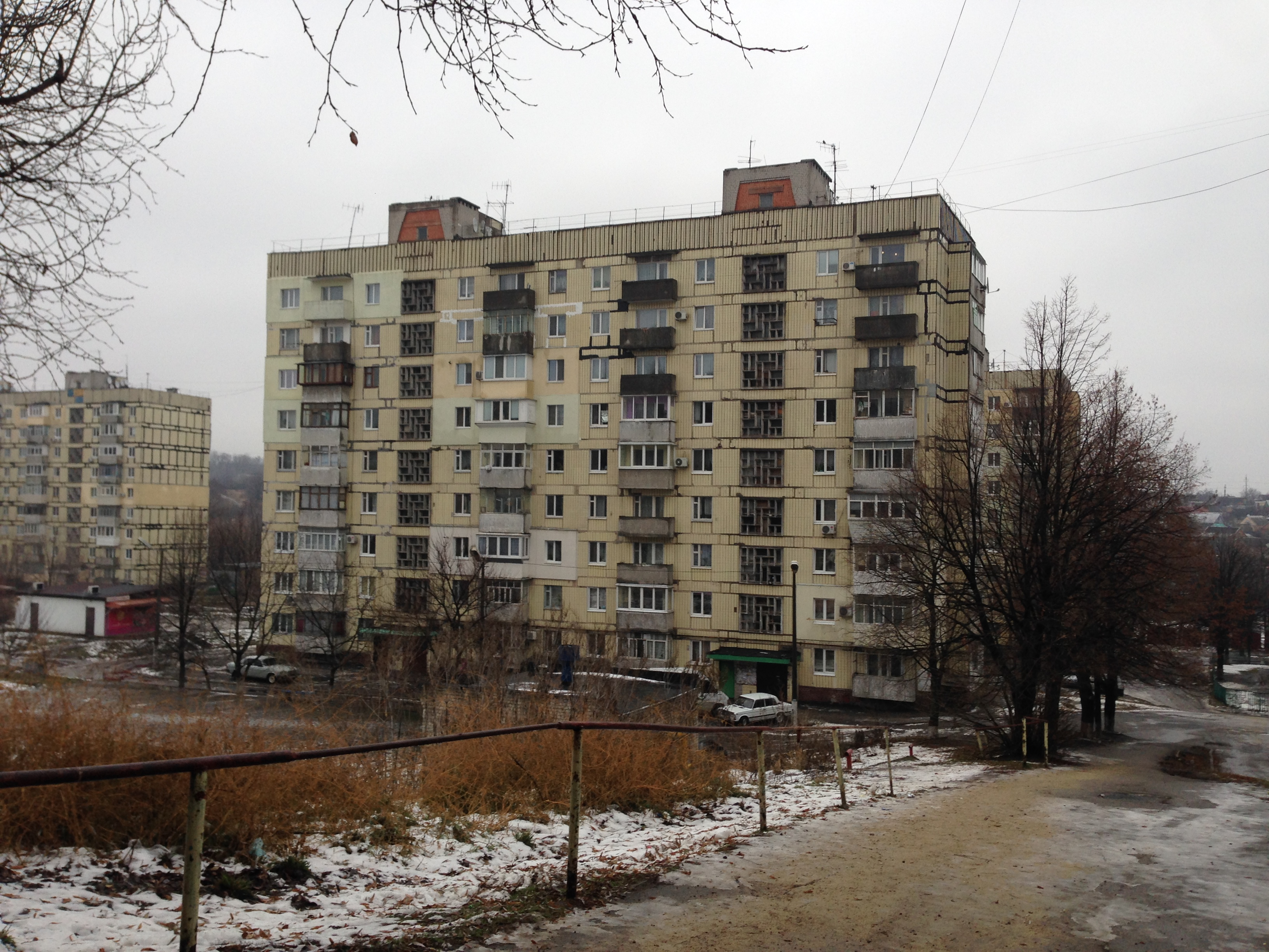 Житловий будинок на території ж/м Кротова (м. Дніпро, вул. Данили Нечая, буд. 17)